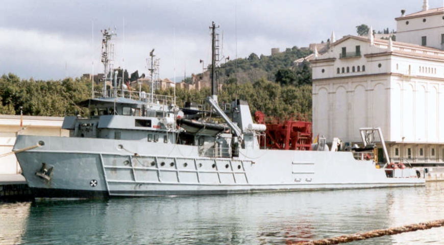 Buque de rescate Neptuno A-20, en Málaga.